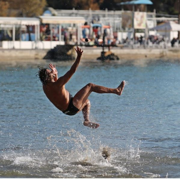 Igrač picigina u skoku